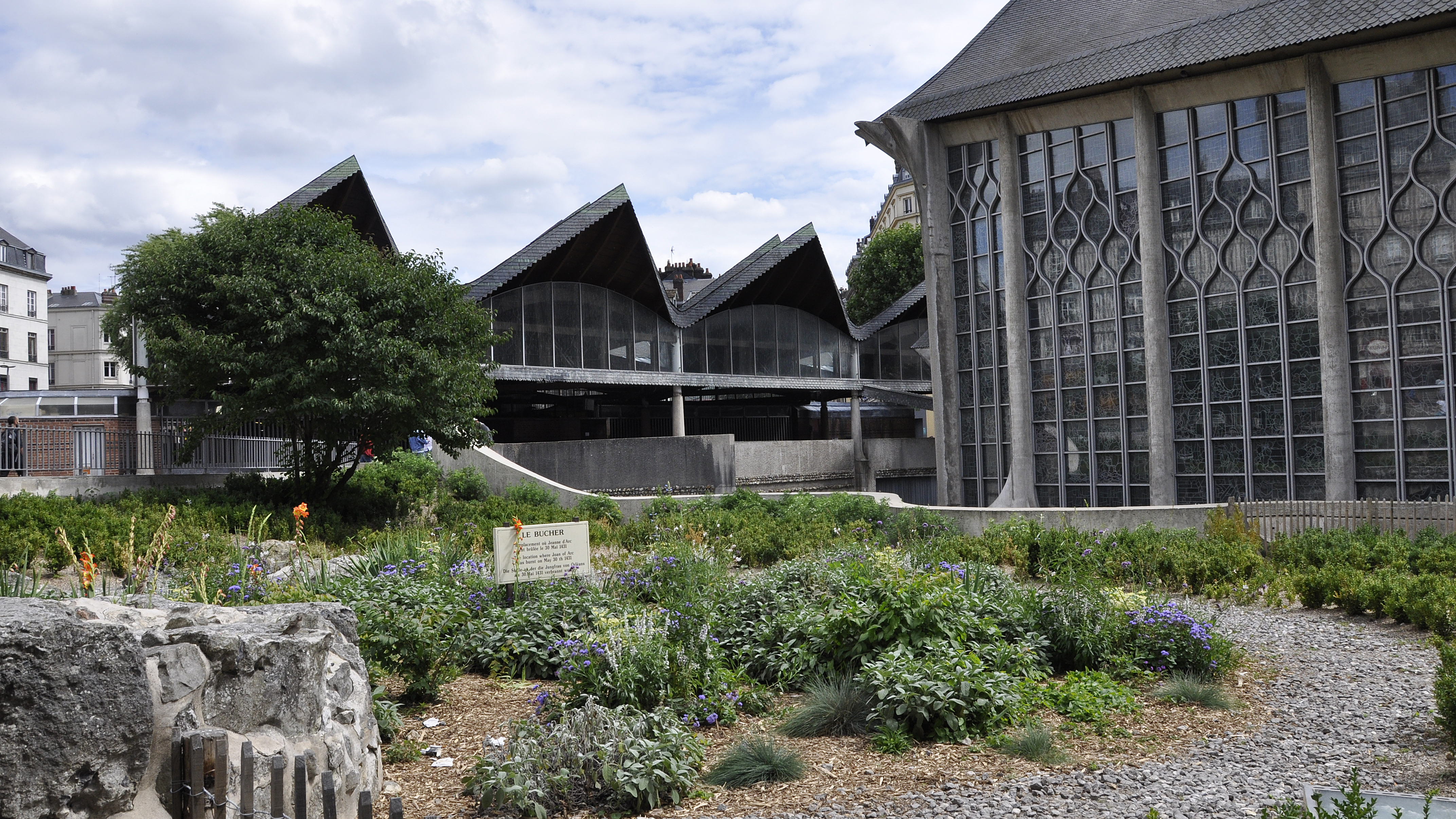 Rouen - place du Vieux Marché met plaats van de brandstapel van Jeanne d'Arc op 30 mei 1431